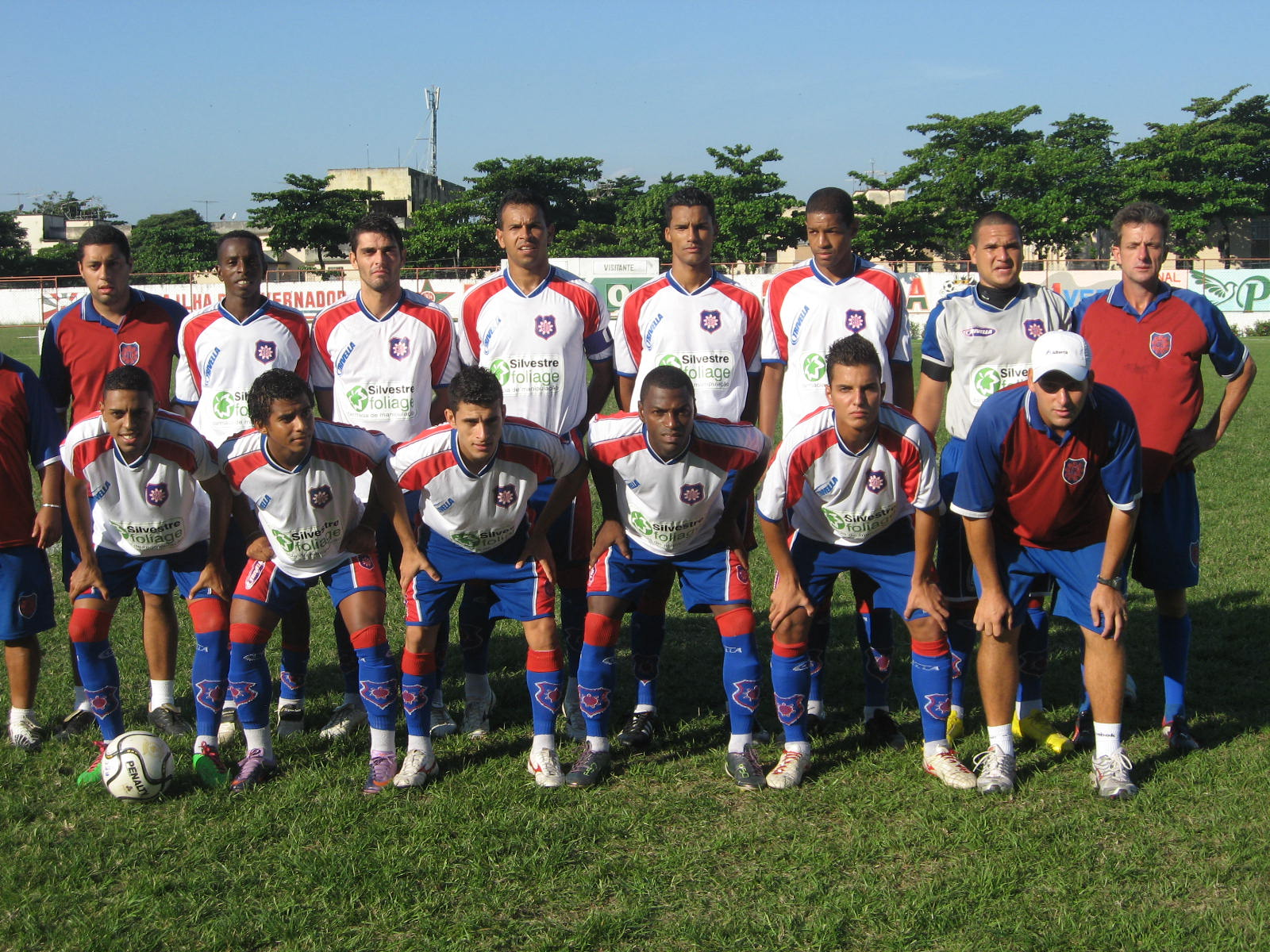 Equipe do Bonsucesso campeã da Série B do Rio de Janeiro de 2011.